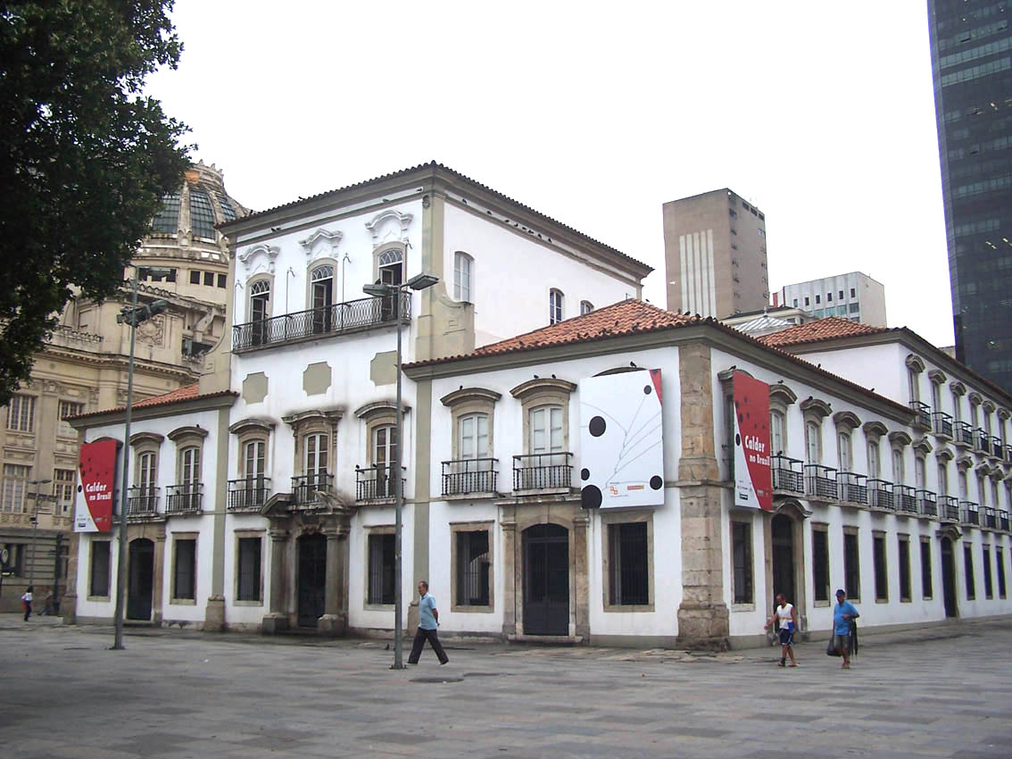 Paço Imperial in Rio de Janeiro, Brazil